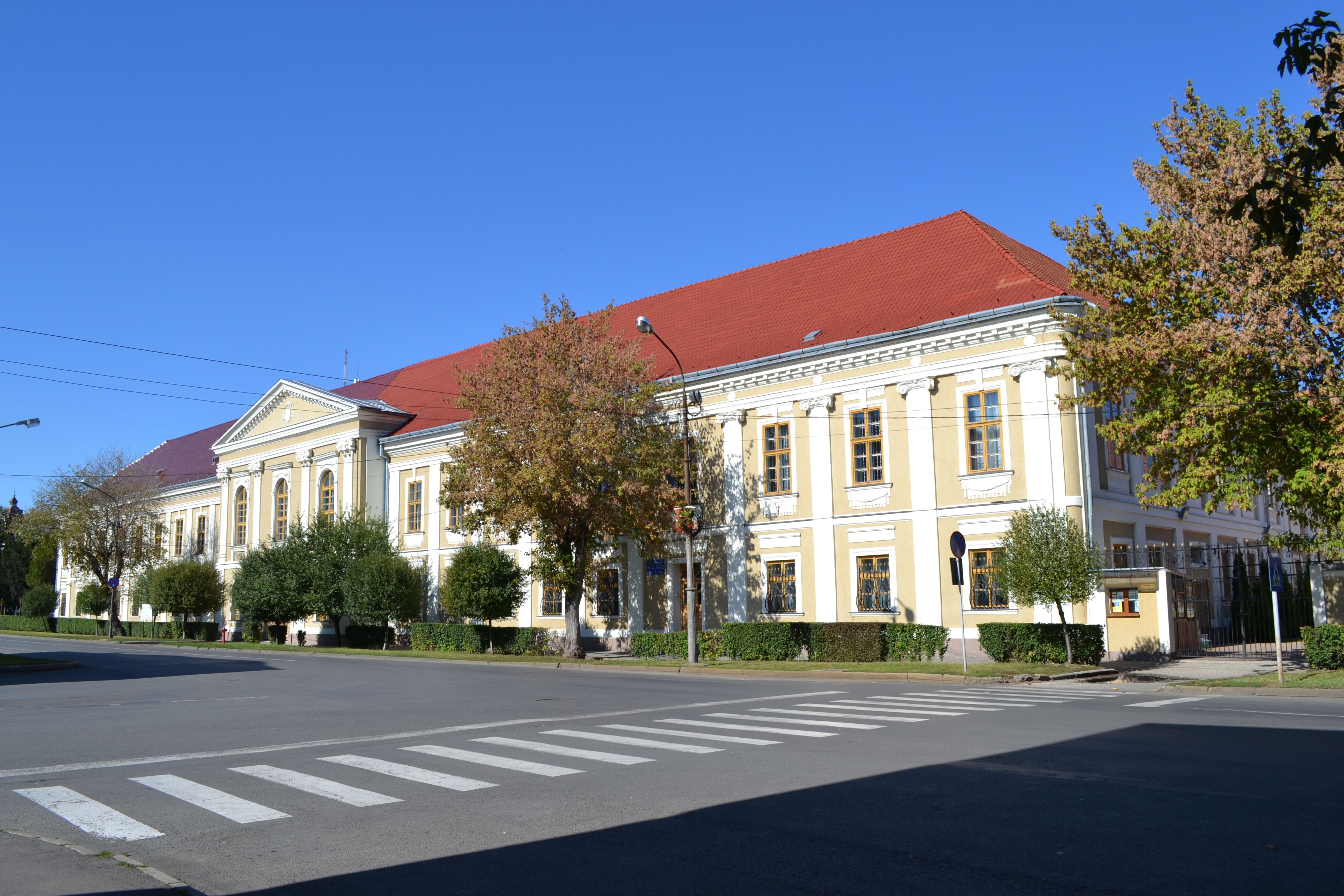 Palatul Episcopiei romano-catolice